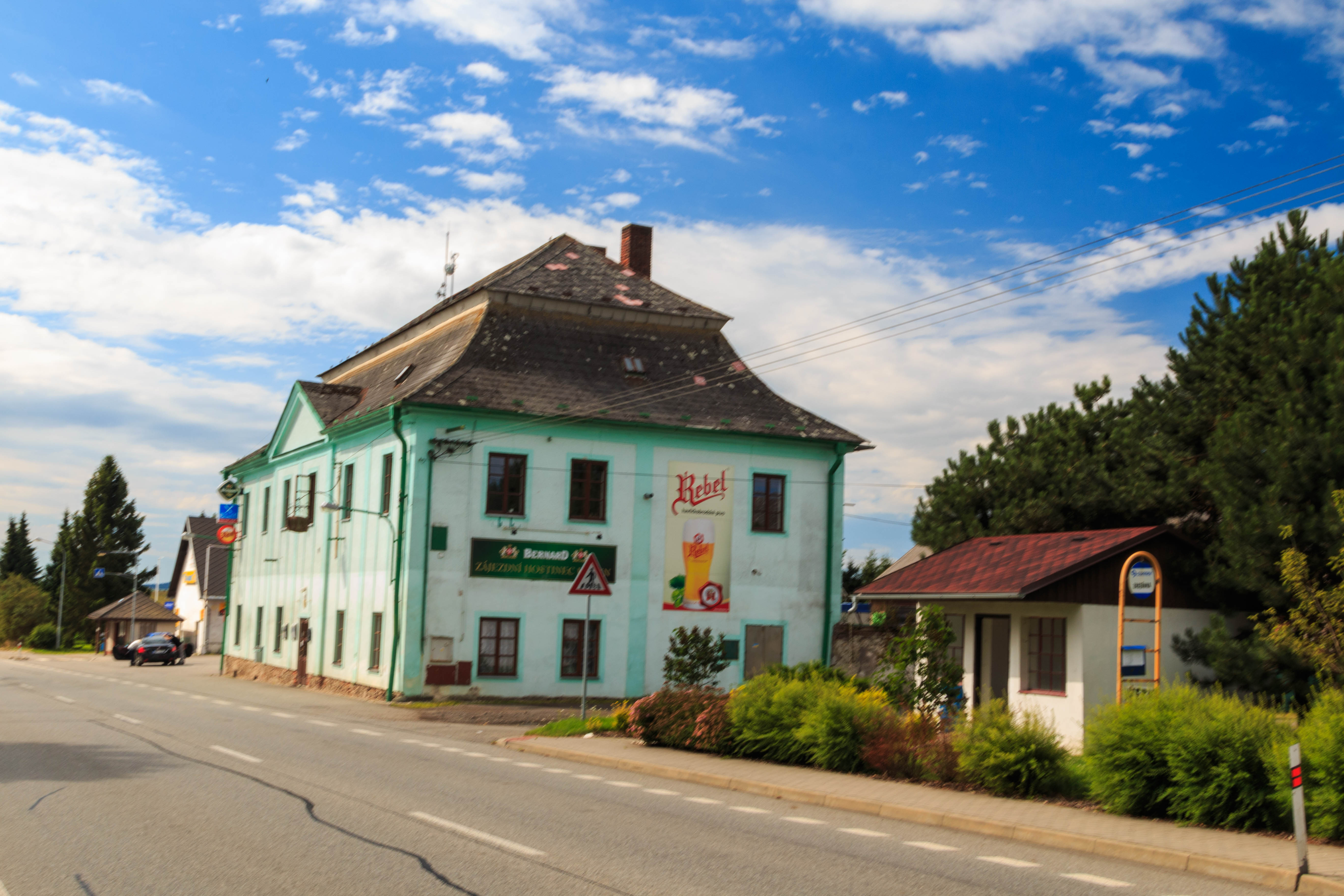 Kámen u Havlíčkova Brodu - hostinec